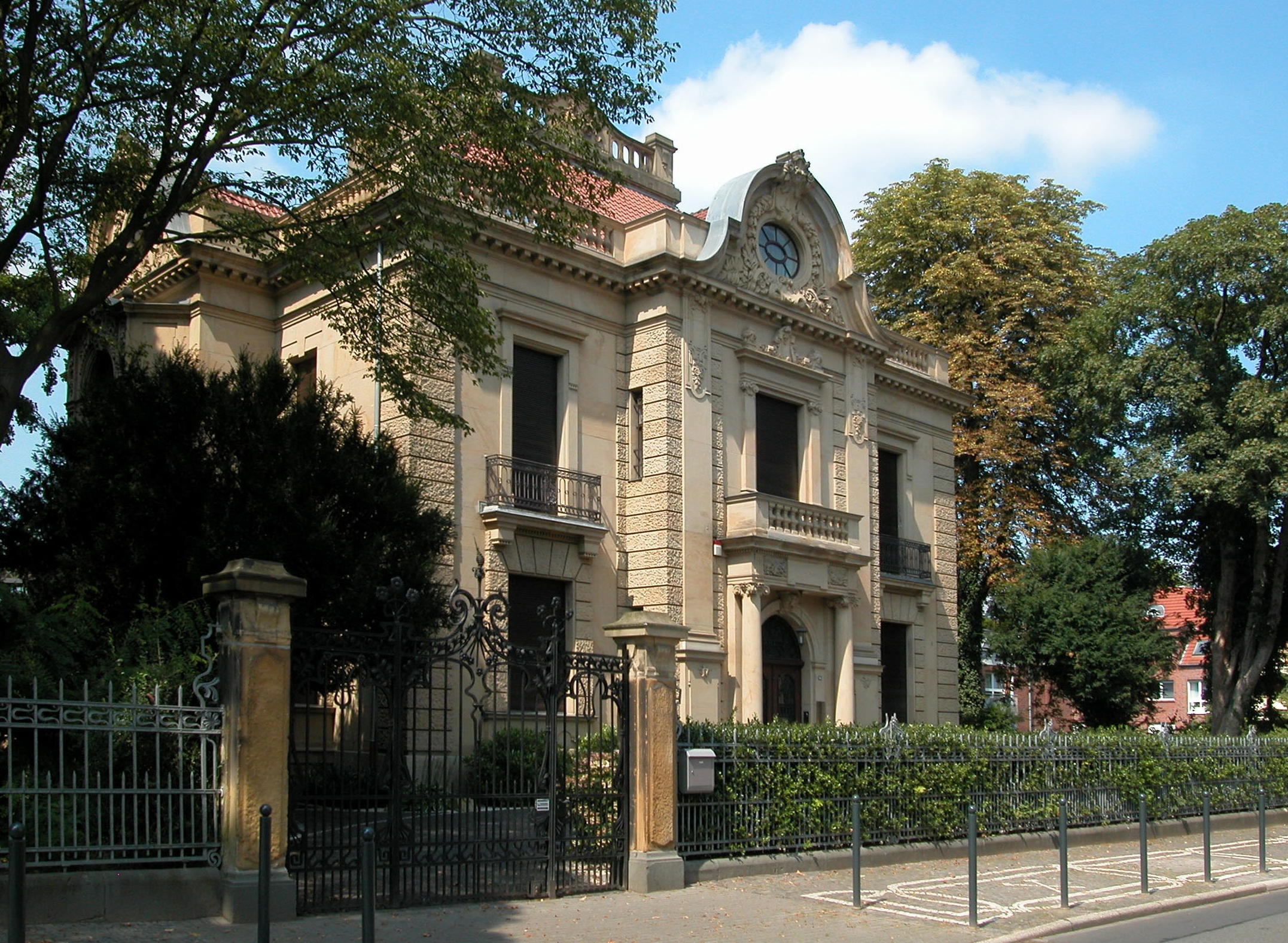 Thyssen-Villa an der Dohne in Mülheim This is the photograph of an architectural monument. It is part of the list of cultural monuments of Mülheim an der Ruhr, no. 57 Kamera-Position: 51°25′5.43″N 6°52′41.97″E / 51.418175°N 6.878325°E Objekt: Dohne